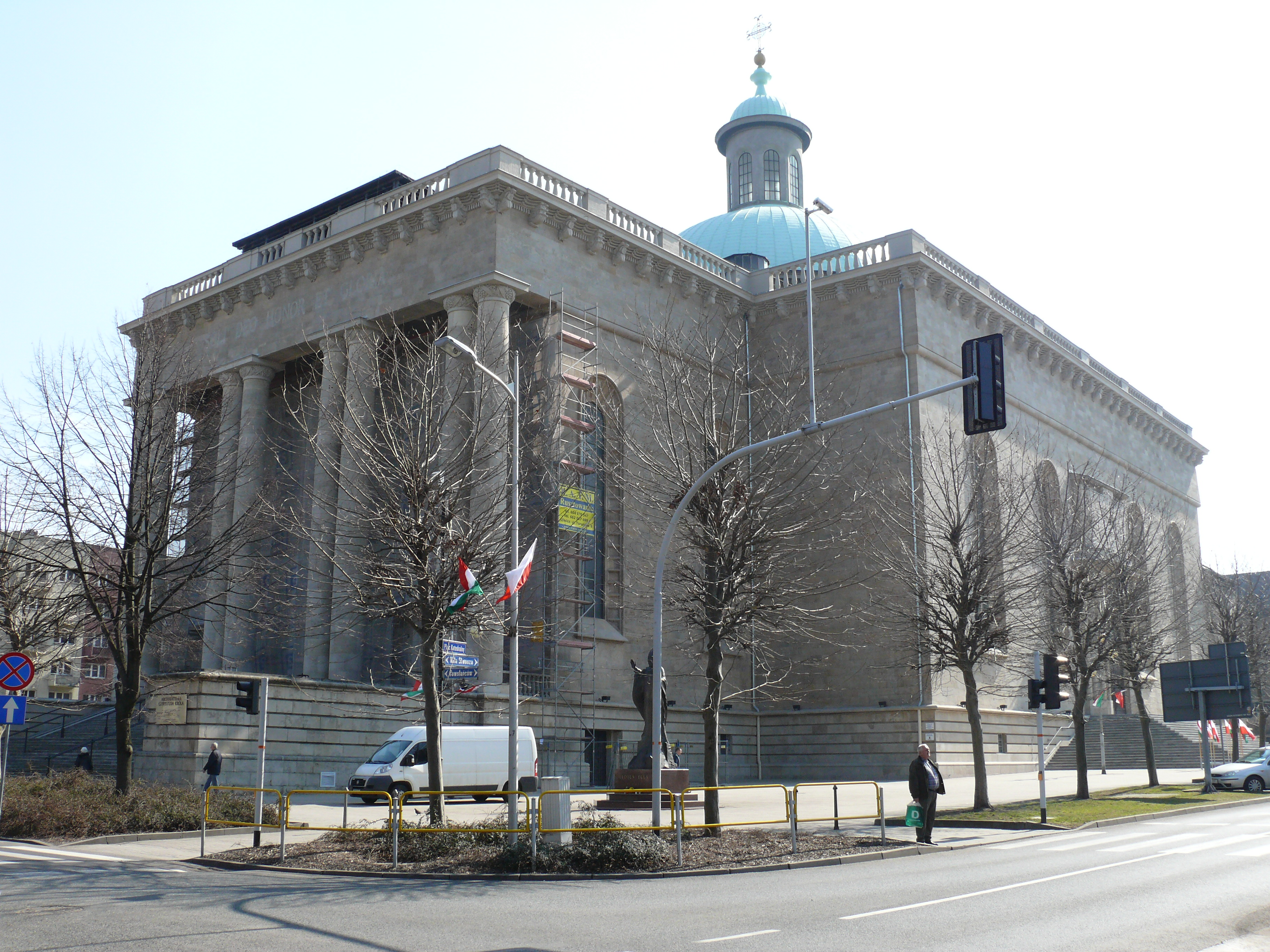 Die Christkönigskathedrale in Kattowitz.